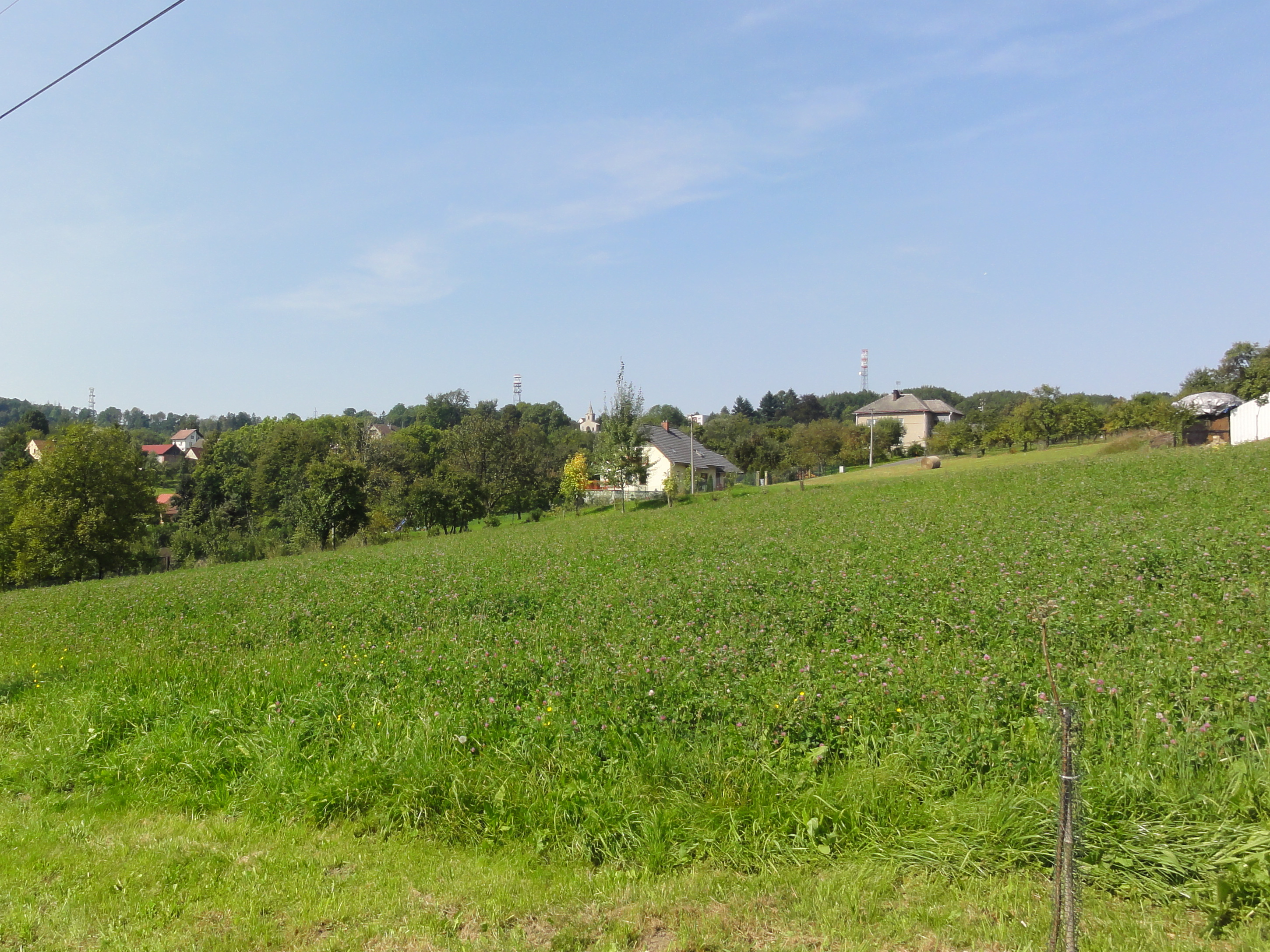 Widok na Mistrzowice, widoczna kaplica cmentarna